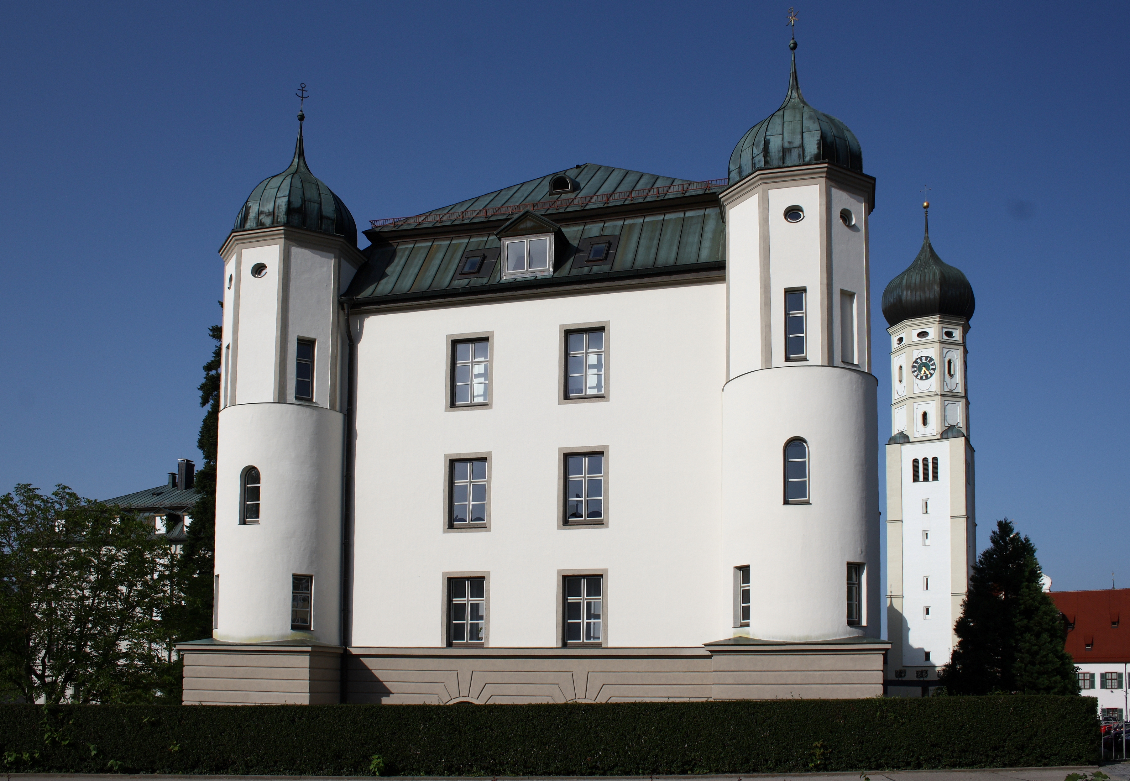 Kloster Ursberg in Ursberg im Landkreis Günzburg (Bayern), Turm der Pfarrkirche St. Johannes Evangelist und Petrus (ehemalige Klosterkirche)